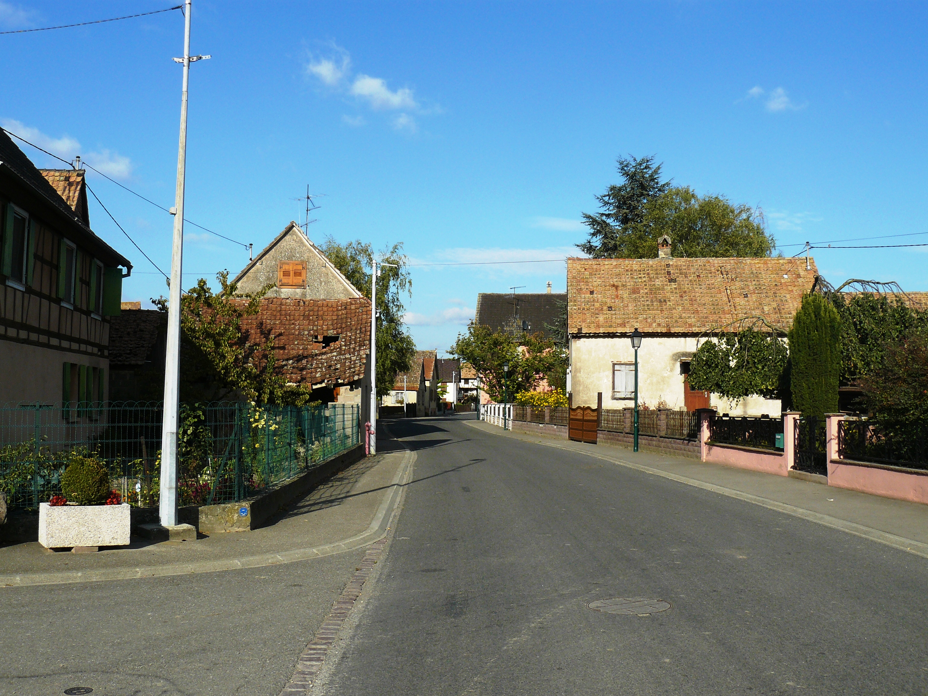 L'artère principale du village